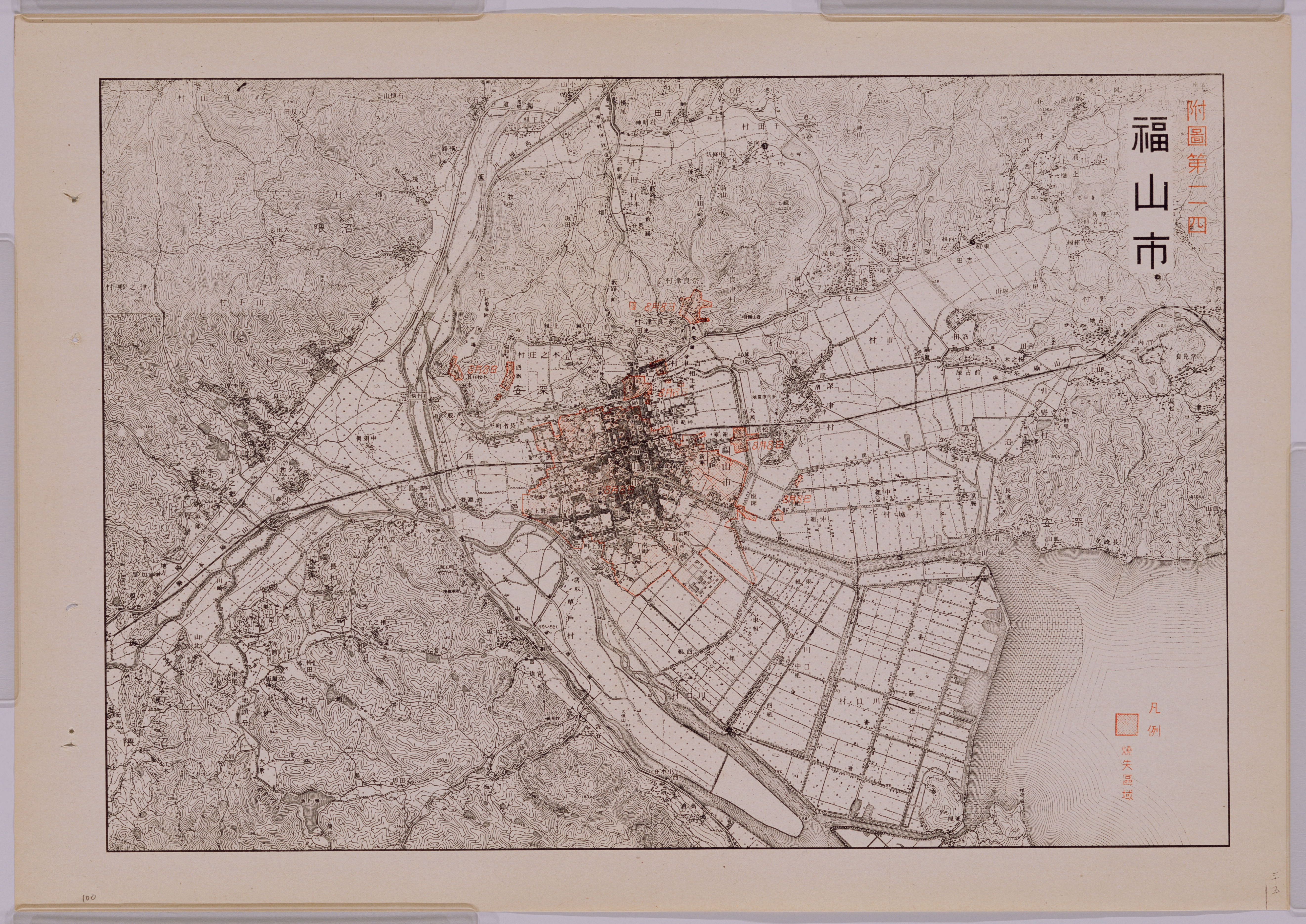 戦災概況図福山 , 1945年12月第一復員省作成